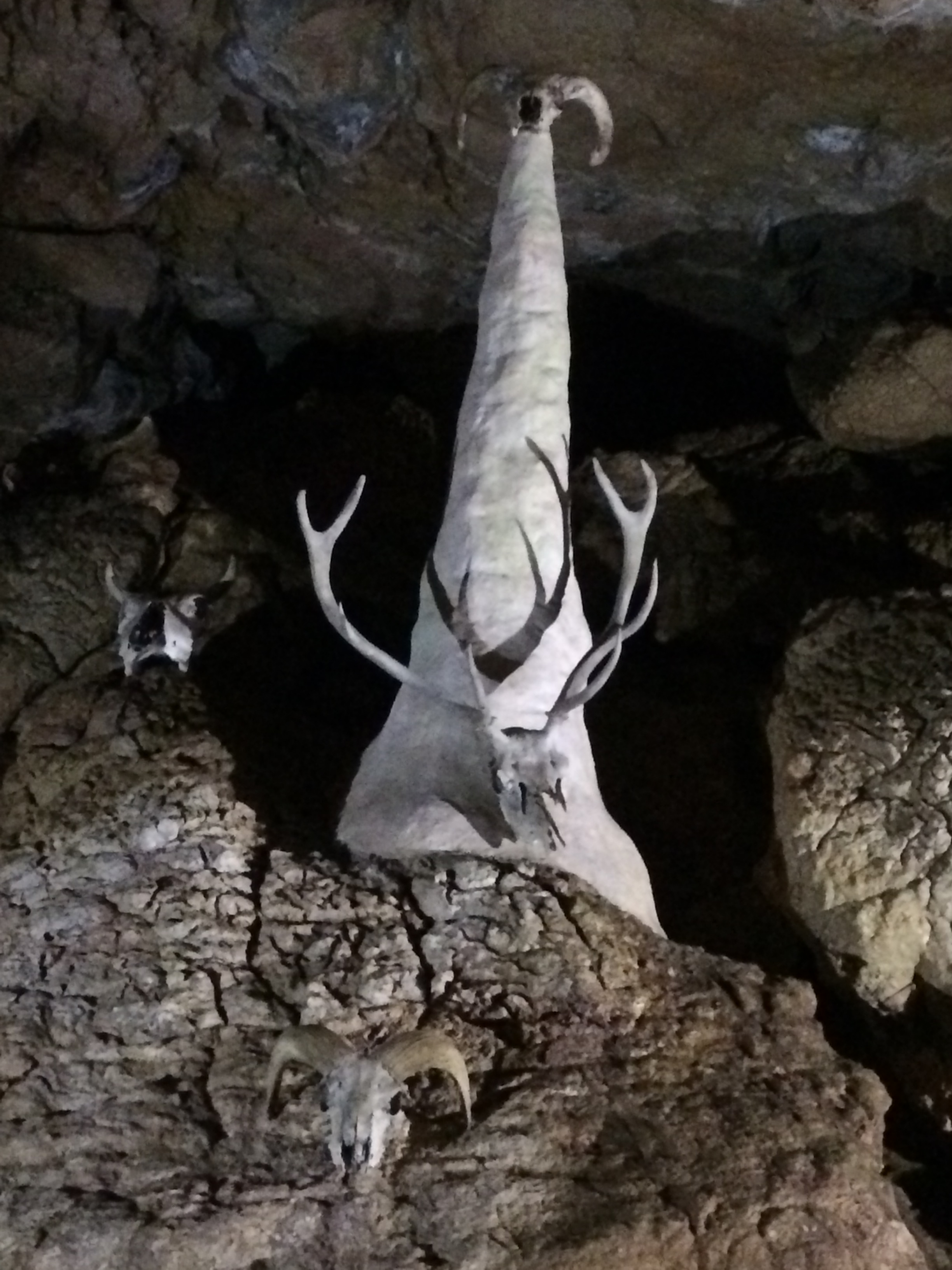 Красные пещеры (Кизил-Коба): в 3 км северо-восточнее села, с. Перевальное, Симферопольский район, Крым This object is located on the Crimean Peninsula and recognized as a protected area by both Russia and Ukraine under the ID: 8210109 / 01-247-5014, respectively. The legal status of the Crimean region is currently disputed.